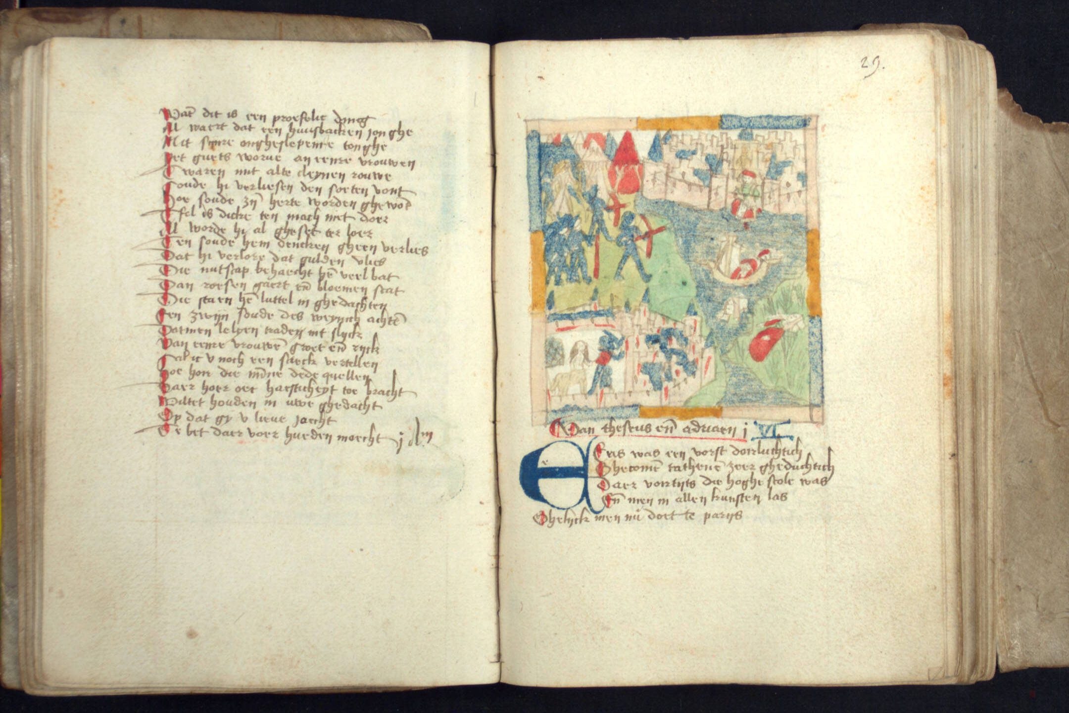 Bladzijden uit Der Minnen Loep van Dirc Potter